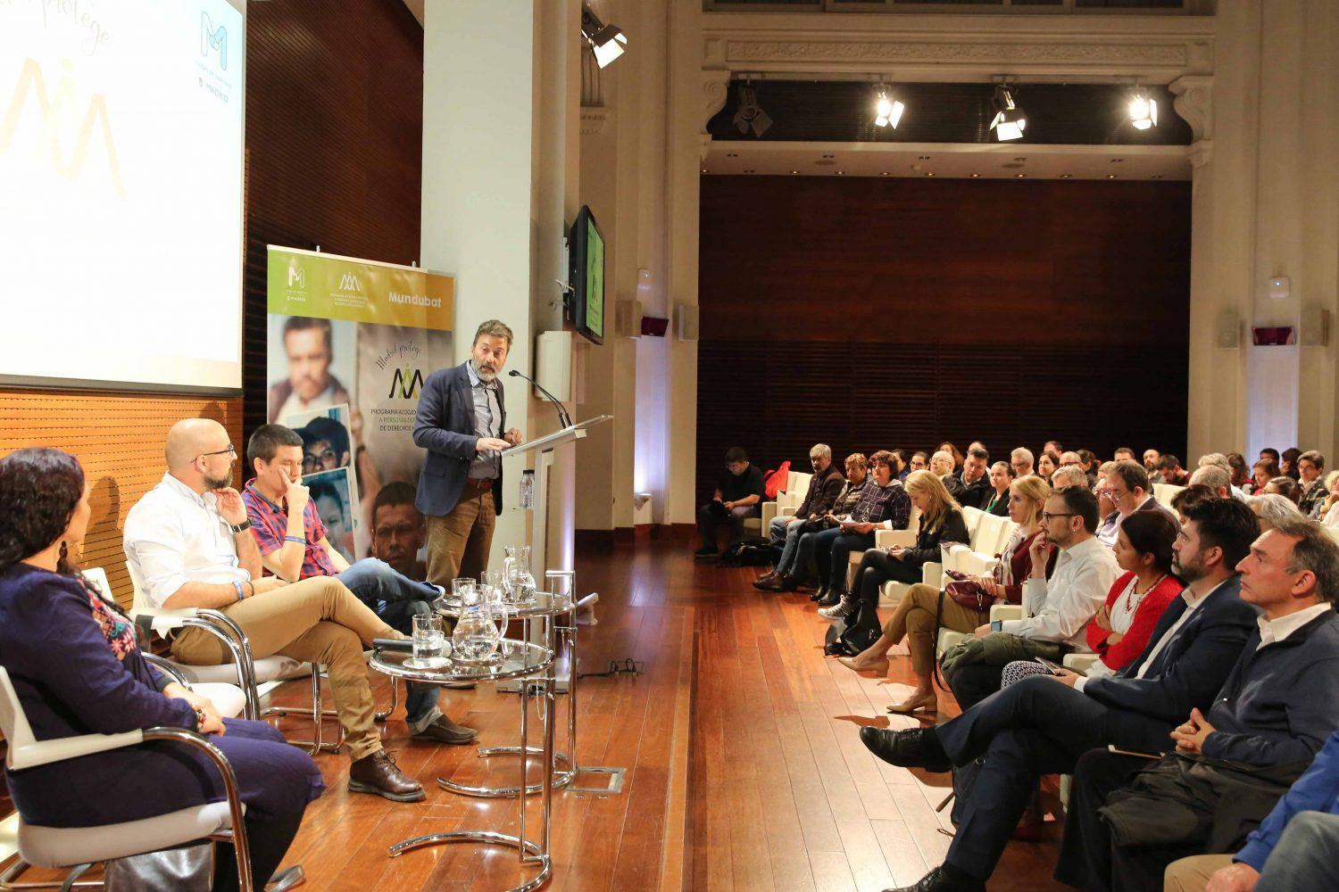 La ciudad de Madrid se convertirá a partir de 2019 en lugar de protección temporal de activistas perseguidos en otros lugares del mundo gracias al Programa de Acogida Temporal de Personas Defensoras de los Derechos Humanos, que hoy ha sido presentado a la ciudadanía. El acto, que se ha desarrollado en el palacio de Cibeles, ha contado con la presencia del tercer teniente de alcalde, Mauricio Valiente; el director de Mundubat, Antonio Montoro; una activista del Movimiento Ríos Vivos Colombia, Rudy Estela Posada, y un representante de la Comisión Justicia y Paz de Colombia, Carlos Fernández.